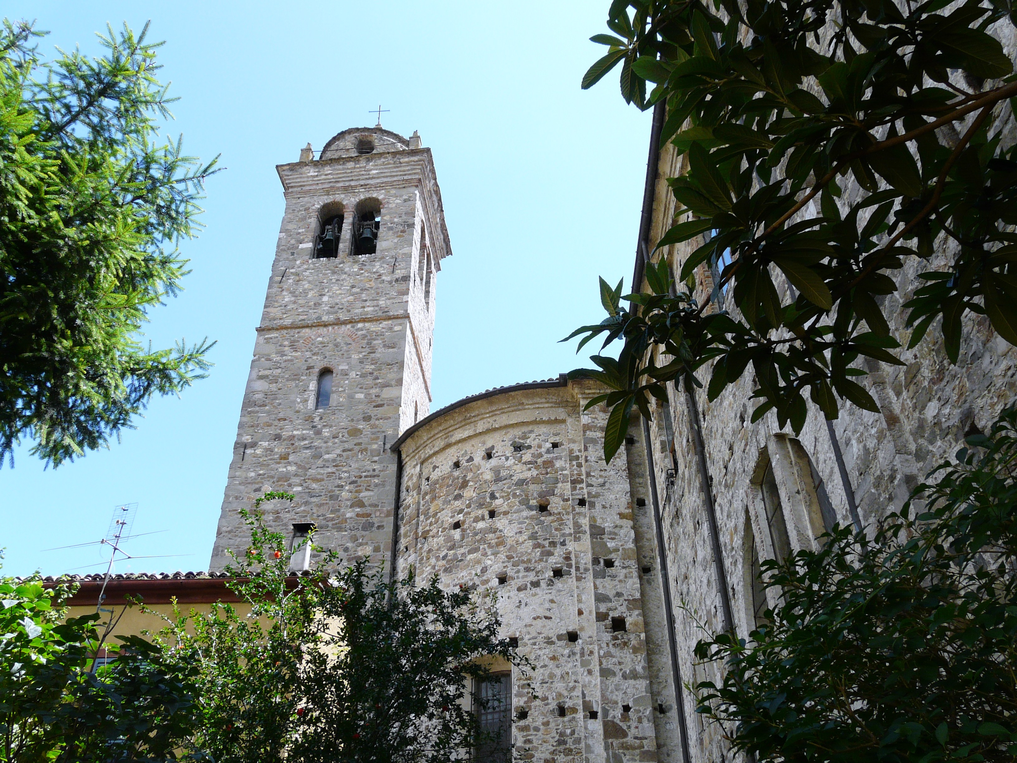 Immagini del santuario della Madonna dell'Aiuto di Bobbio, Emilia-Romagna, Italia